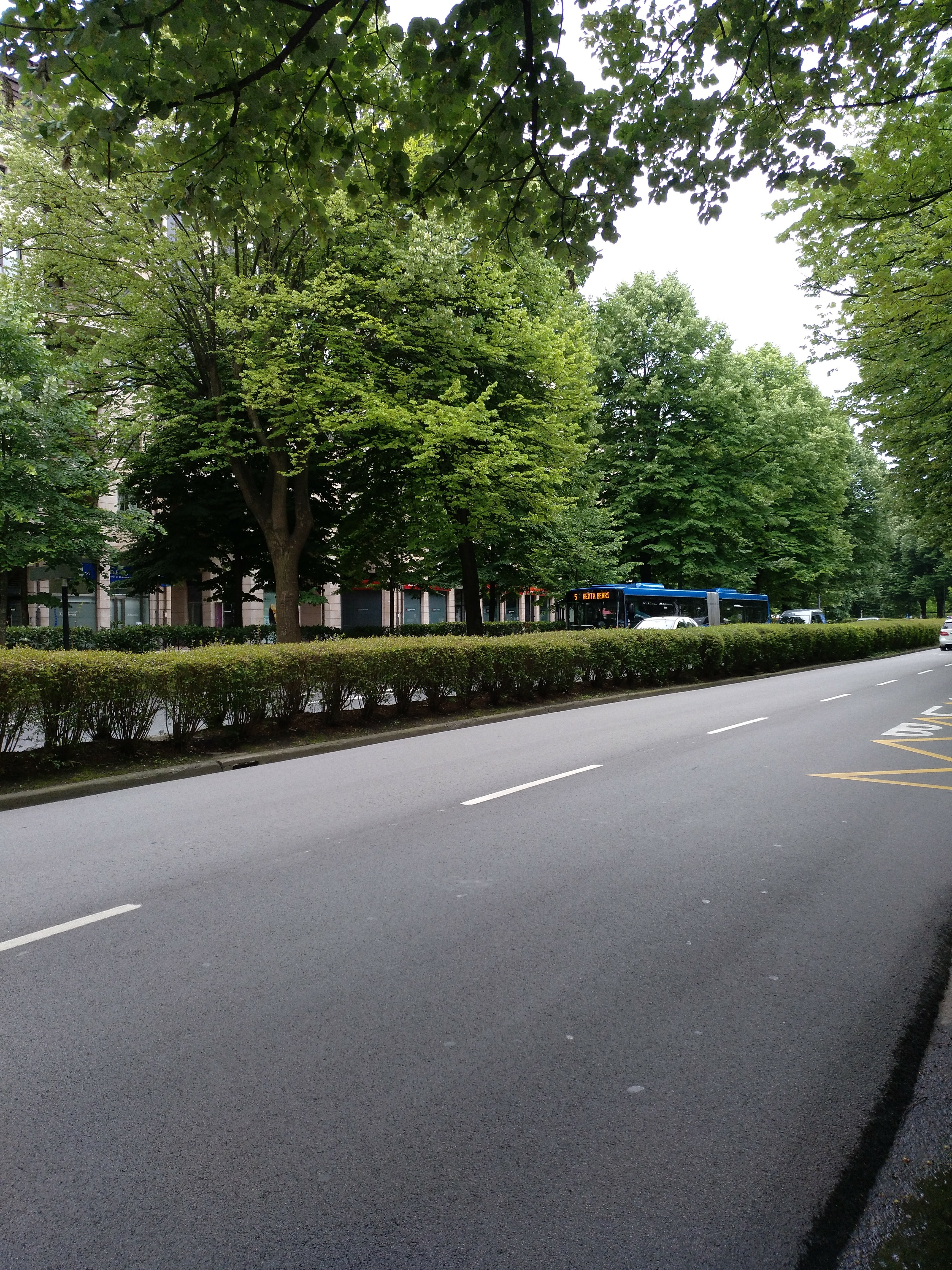 Autobus urbano de d·bus de la línea 5 en la Avenida Tolosa en San Sebastián